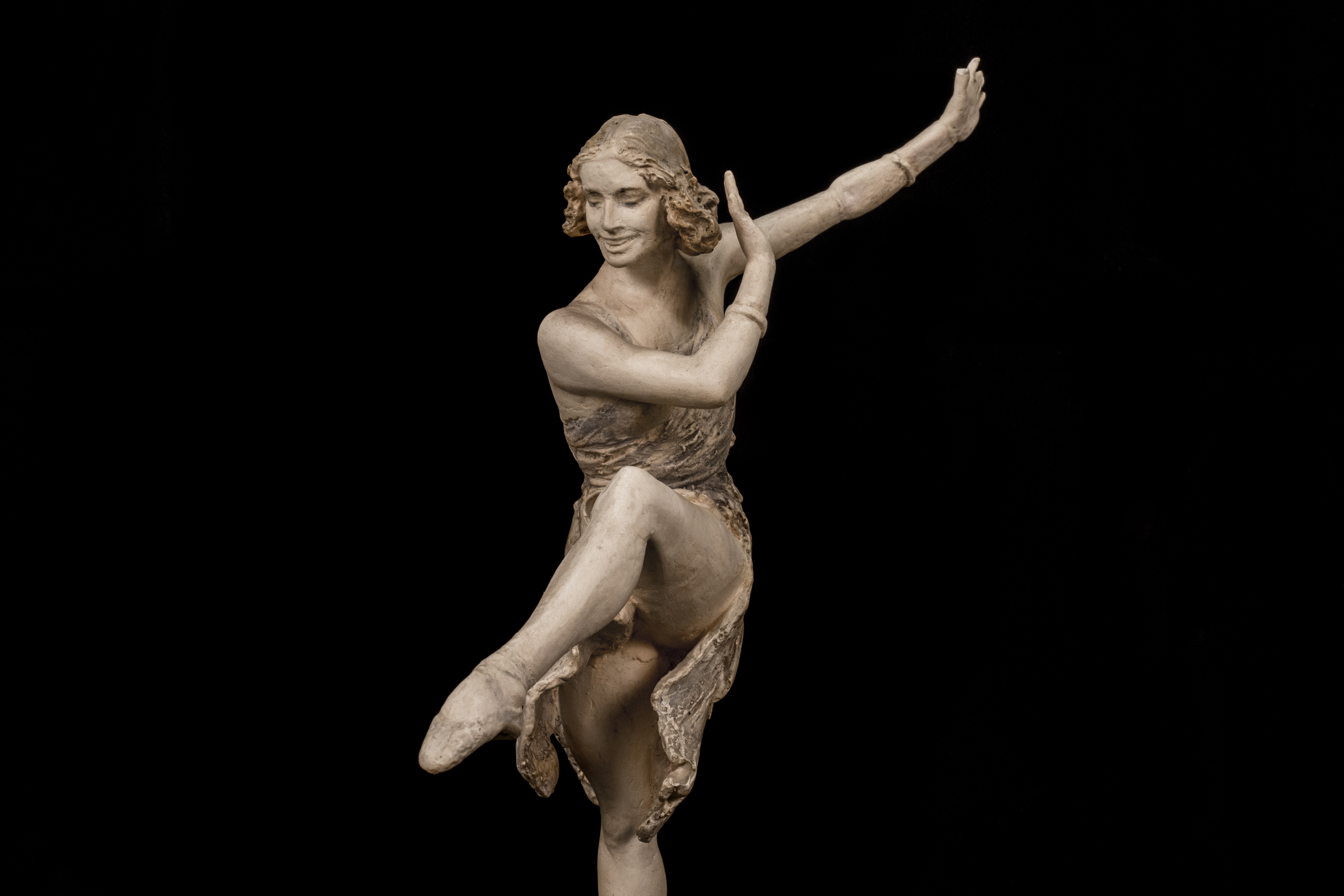 Axel Lochers teaterstatuette "Else Højgaard som Tata i 'Tata' af Emil Mobeck." U.å. Gips, højde 31,2 cm. Værket tilhører Skagens Kunstmuseer